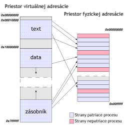 Bežný spôsob použitia stránkovania na vytvorenie priestoru virtuálnej pamäte